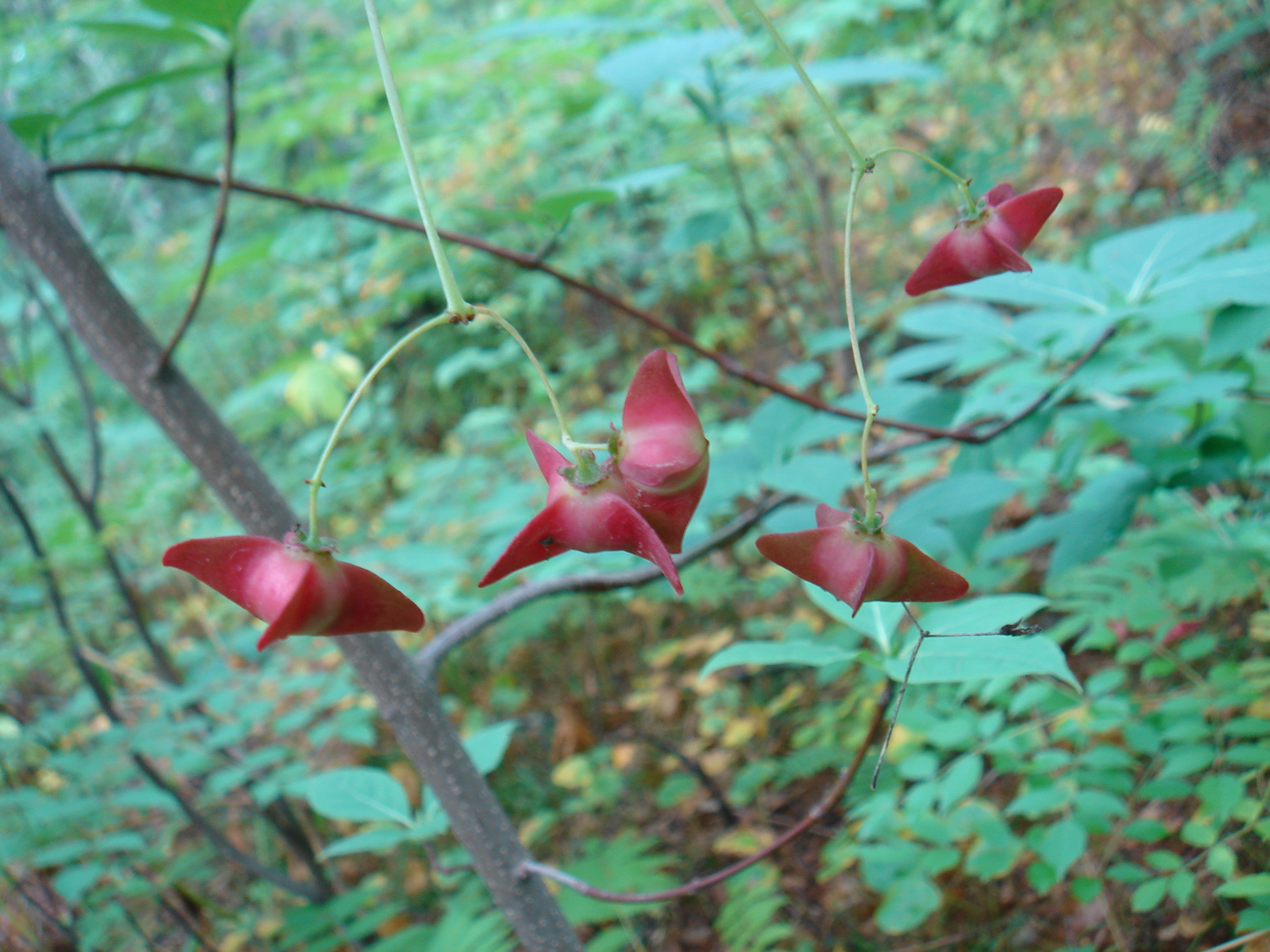 Сахалин